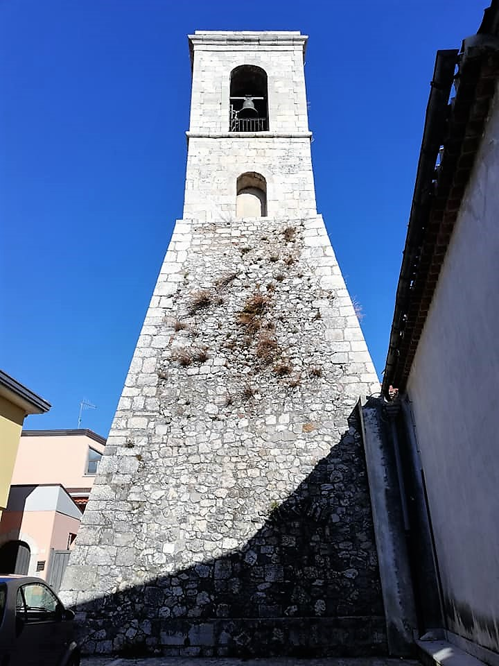 Campanile chiesa di Santa Maria Assunta.